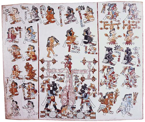 Lámina 37 del Códice Vindobonensis o Yuta Tnoho (cultura mixteca, poscláisco tardío mesoamericano)